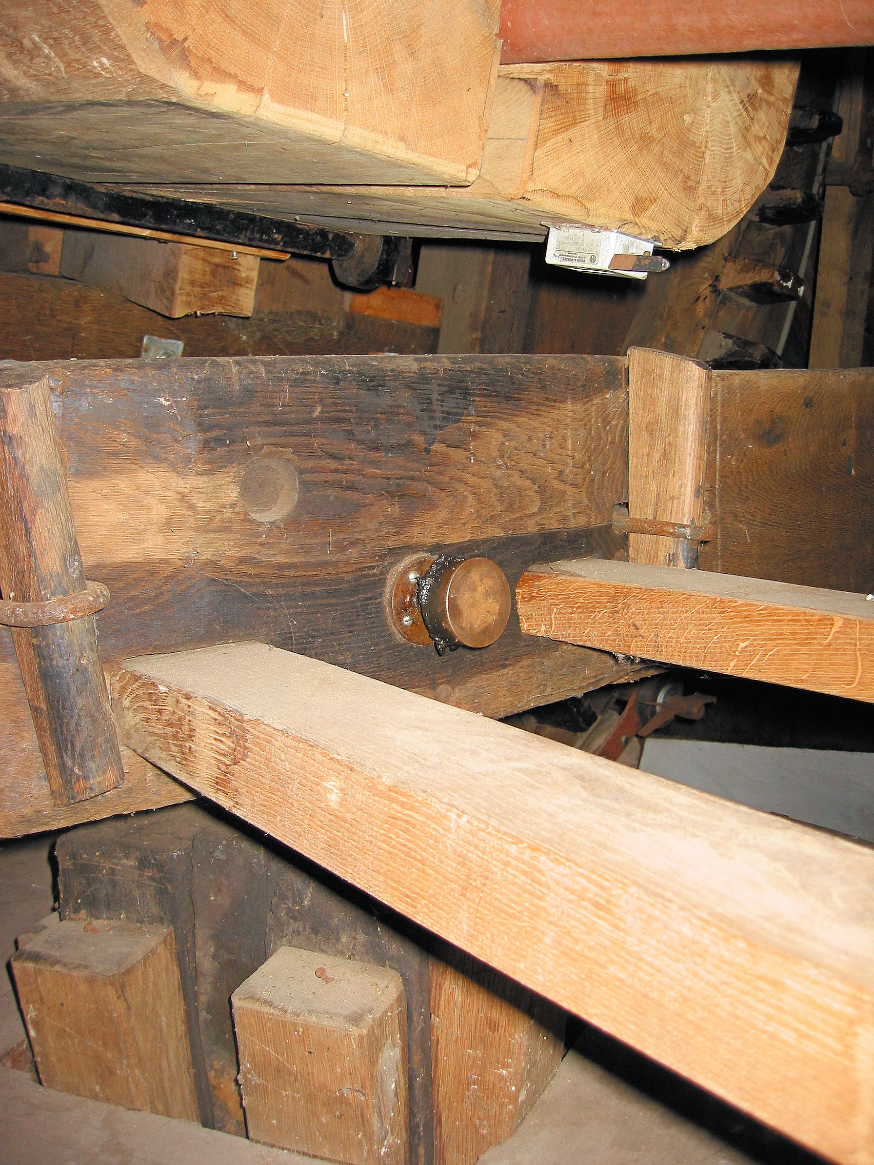 Busdeur met stauferpot van de Nieuwe molen in Veenendaal, the Netherlands